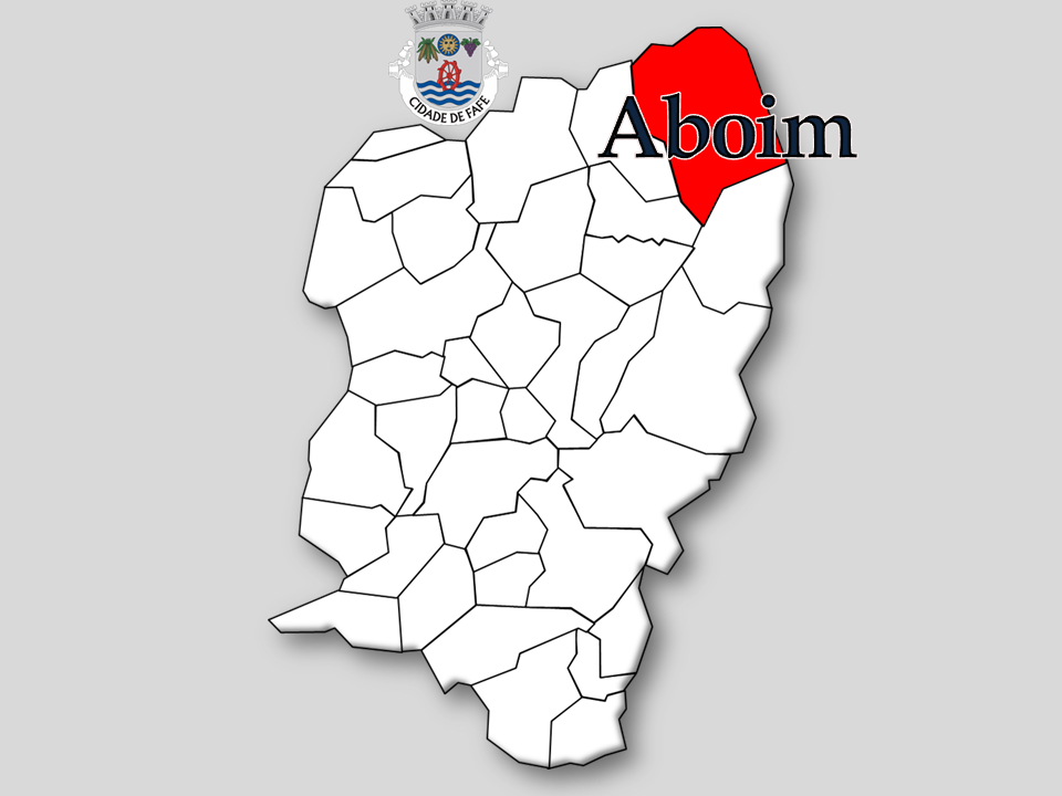 Censos 1864/2011